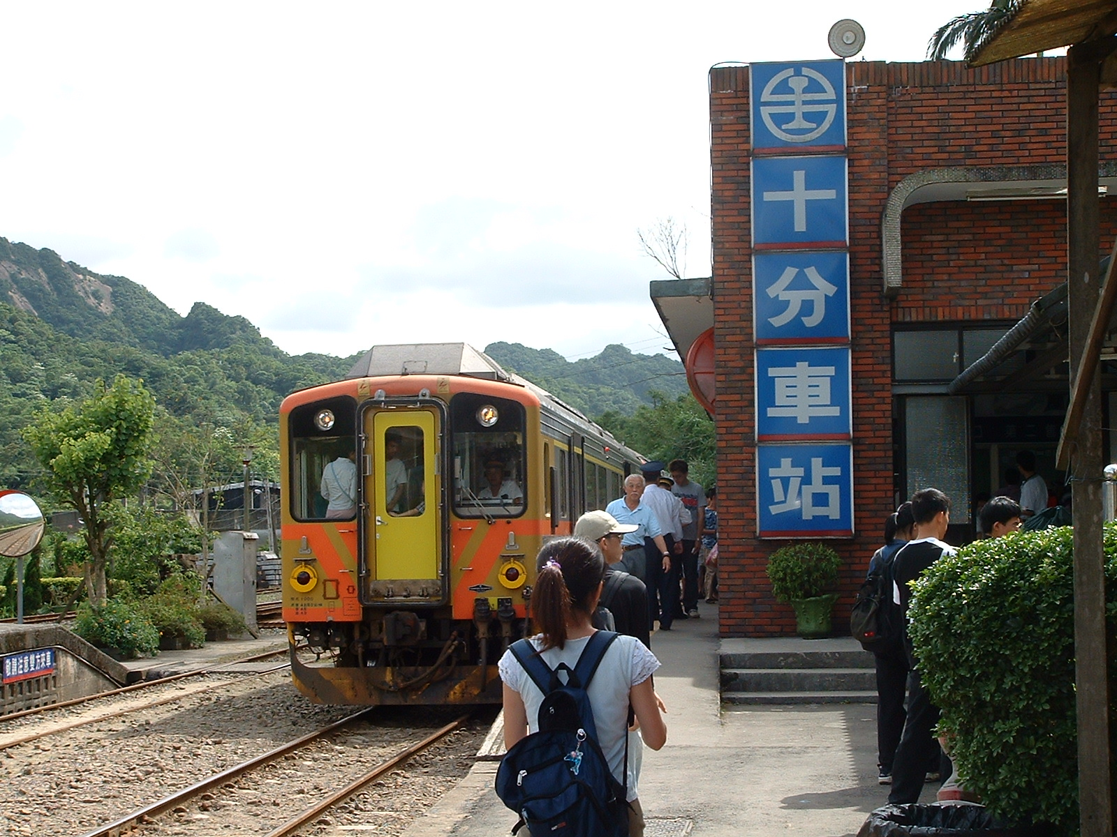 臺灣鐵路管理局DR1000型柴油客車停靠十分車站。